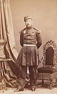 Armand-Octave-Marie d’Allonville (1809-1867), Famille d'Allonville